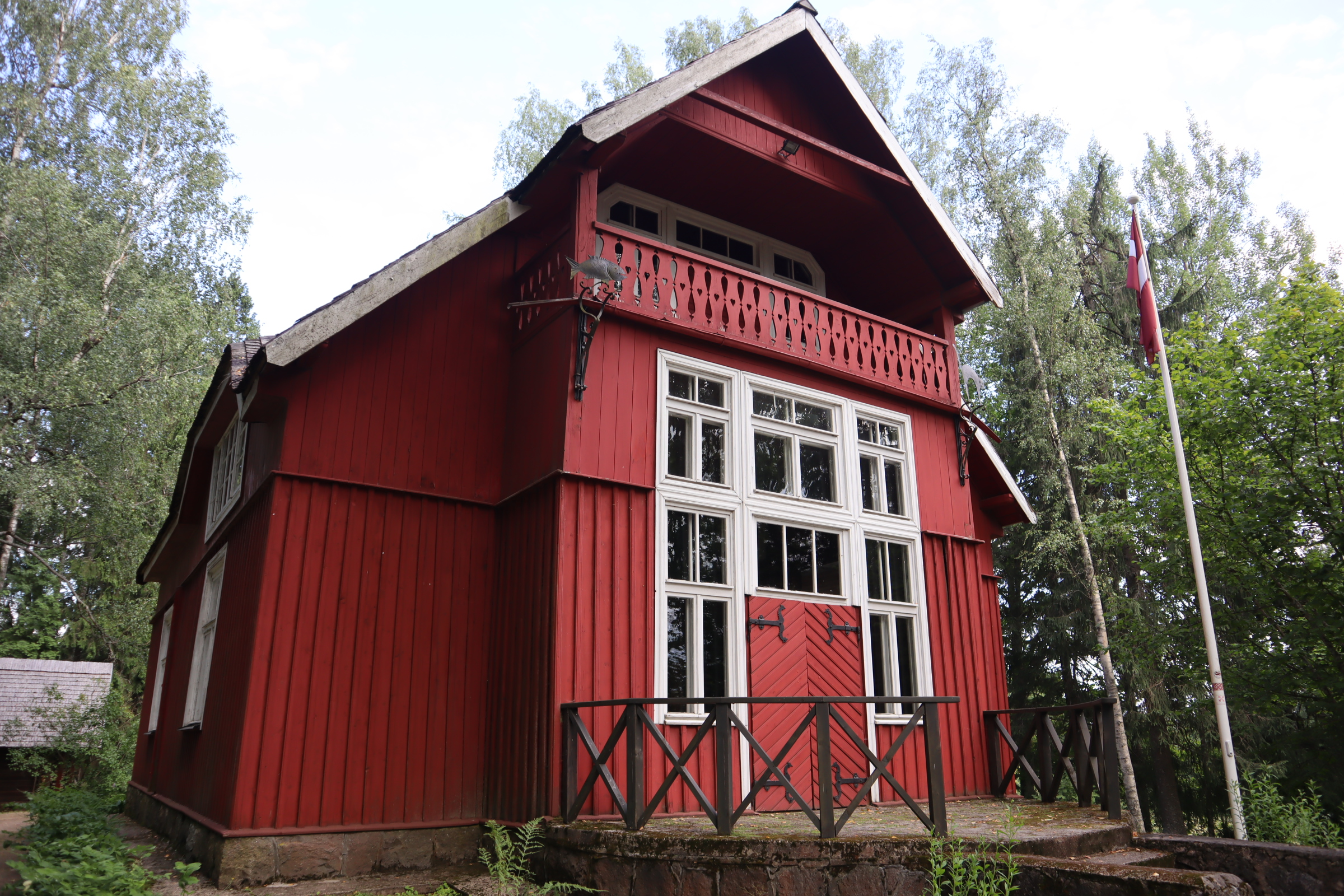 Kārļa Skalbes memoriālais muzejs "Saulrieti" Vecpiebalgas pagastā.